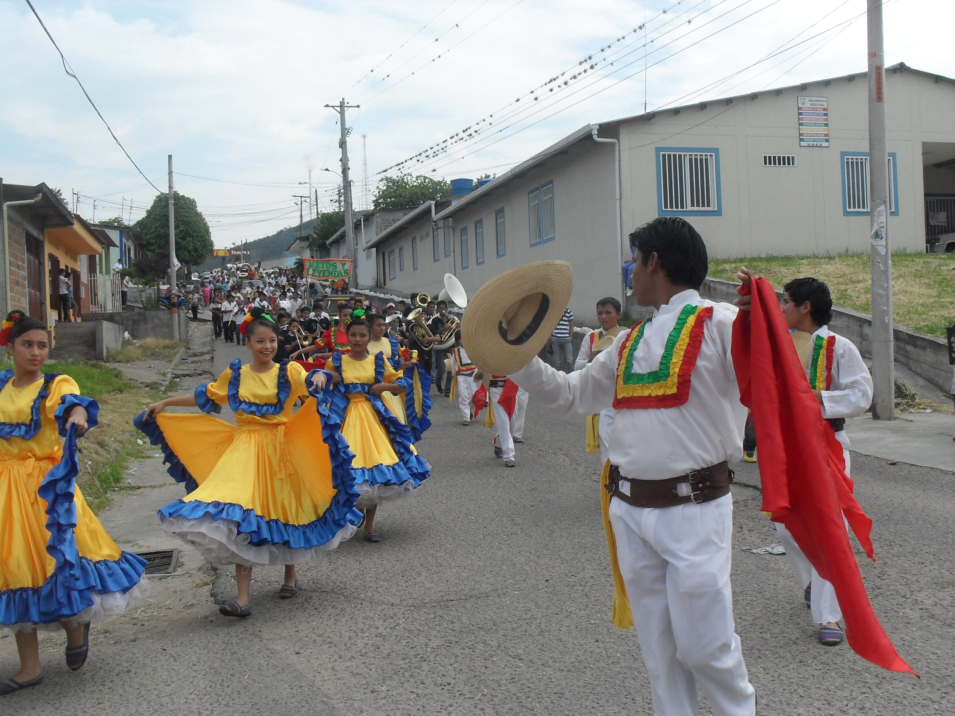 Desfile en marco de las festividades patronales